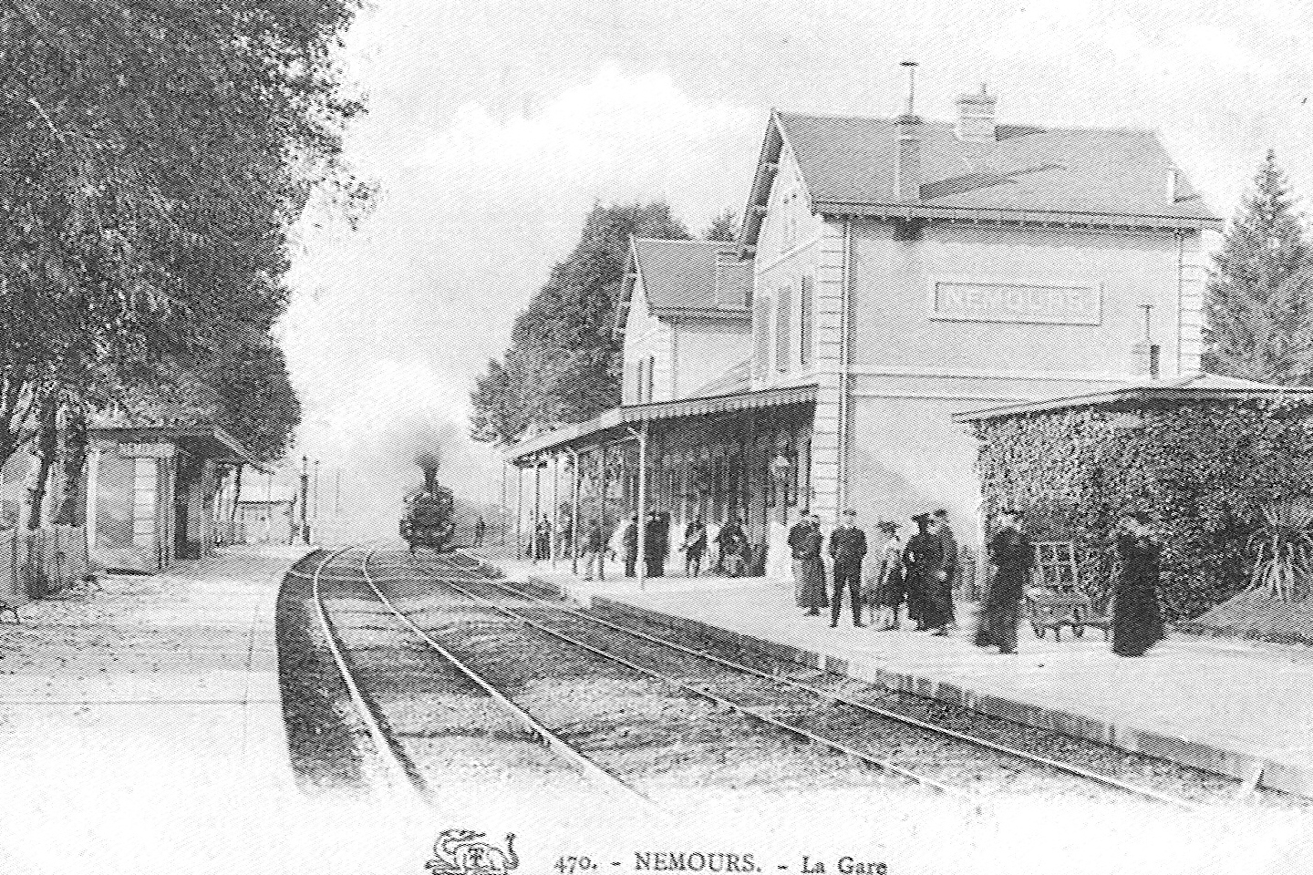 La gare de Nemours (Seine-et-Marne), au début du XX° siècle.